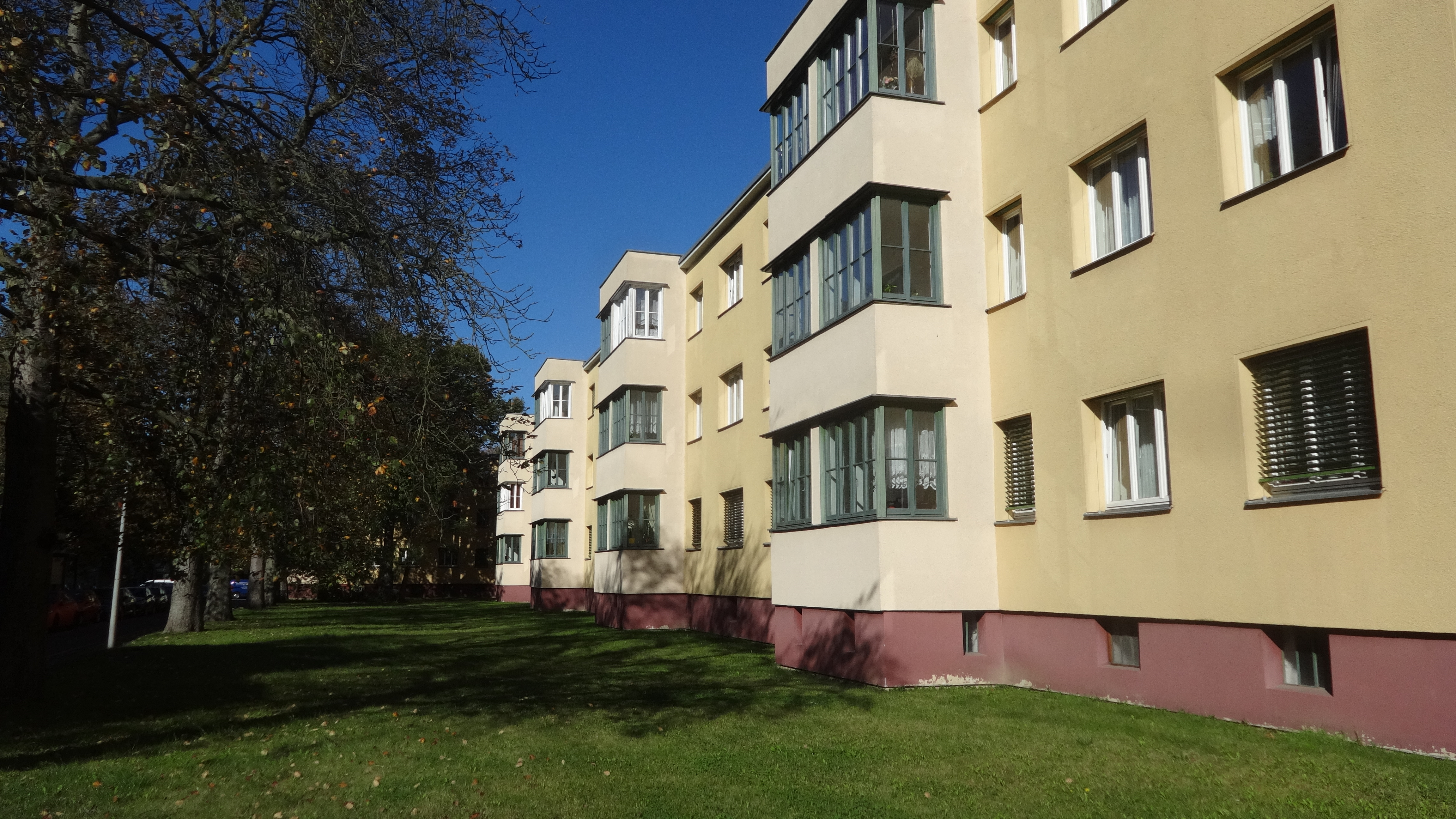 Leipzig, Gohlis-Nord, Krochsiedlung (Bauhausstil, 1929/30)